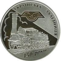 монета 150-річчя діяльності українських залізниць реверс